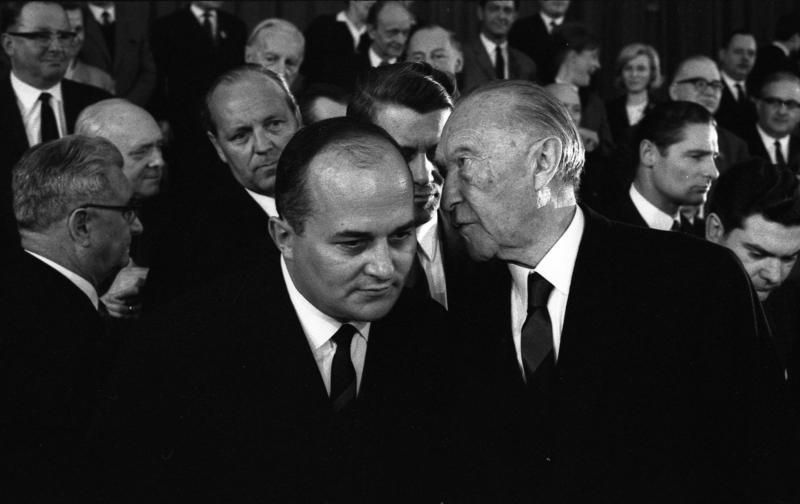 CDU - Bundesparteitag in Düsseldorf